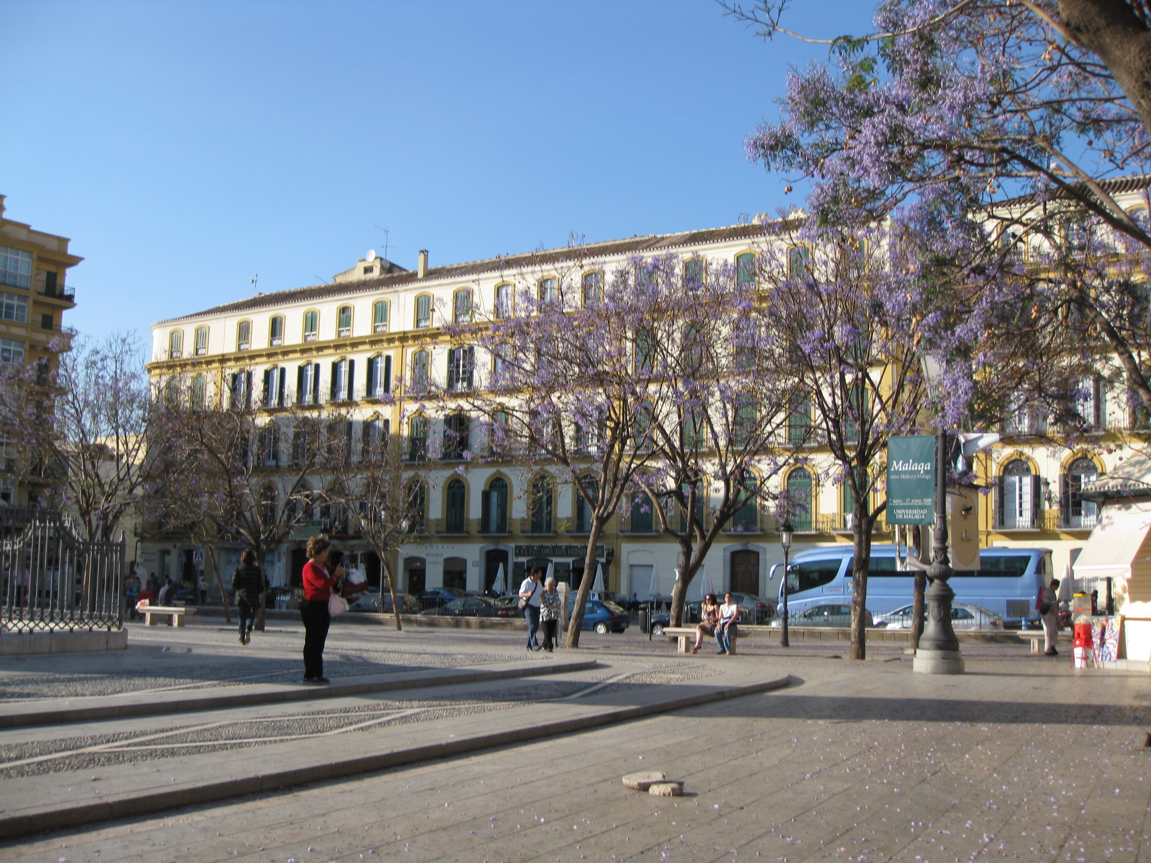 Plaza de la Merced, Málaga, España